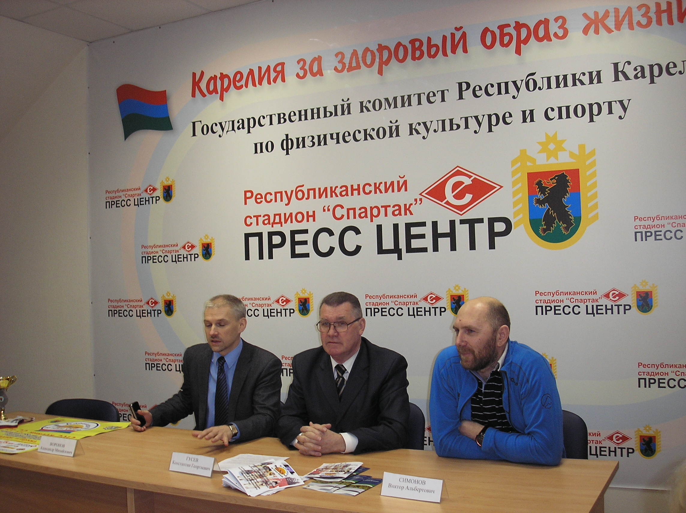 Пресс-конференция в Петрозаводске 17 января 2012 года, посвящённая гонке "По земле Сампо"